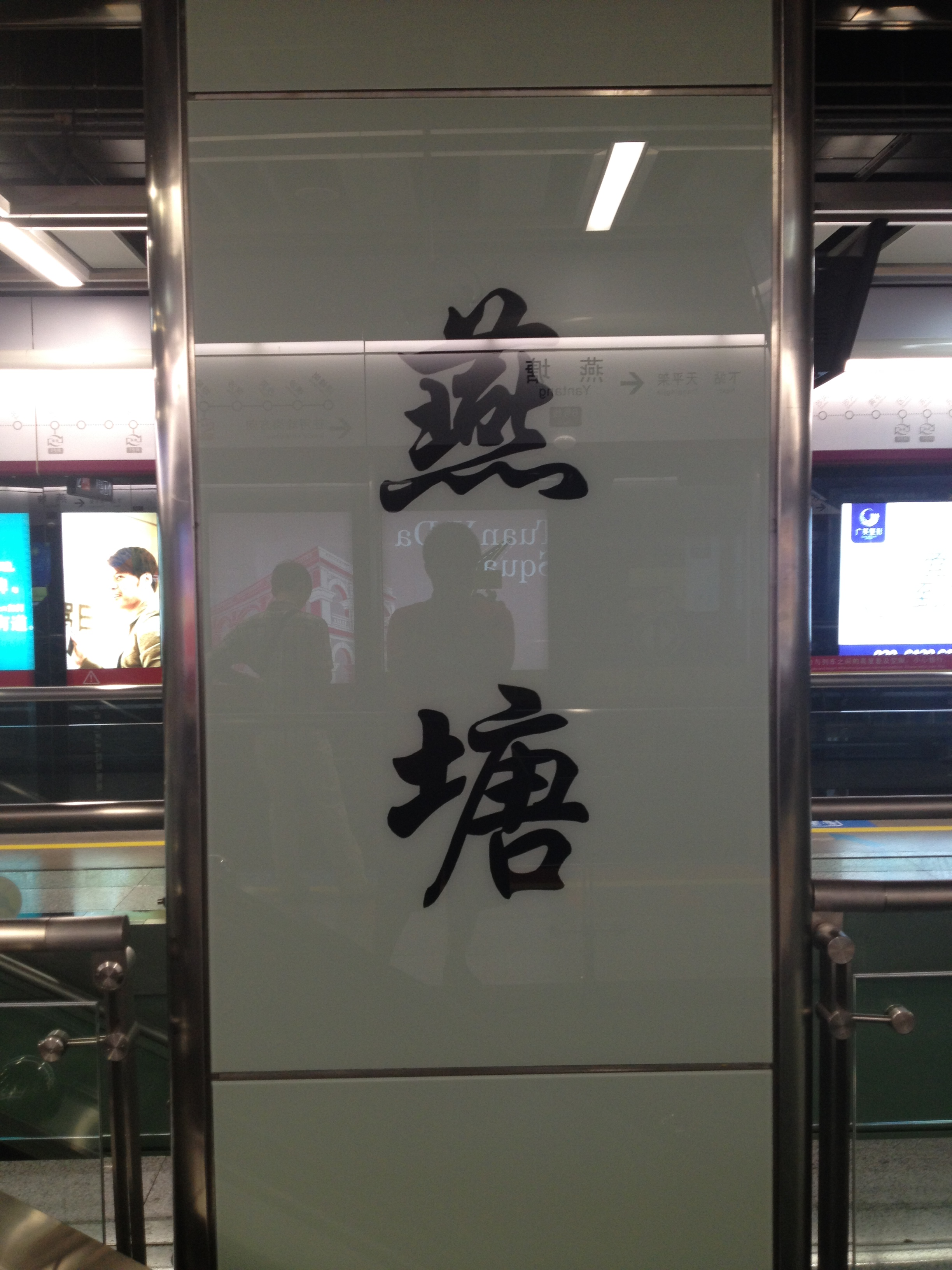 广州地铁6号线燕塘站站台大字